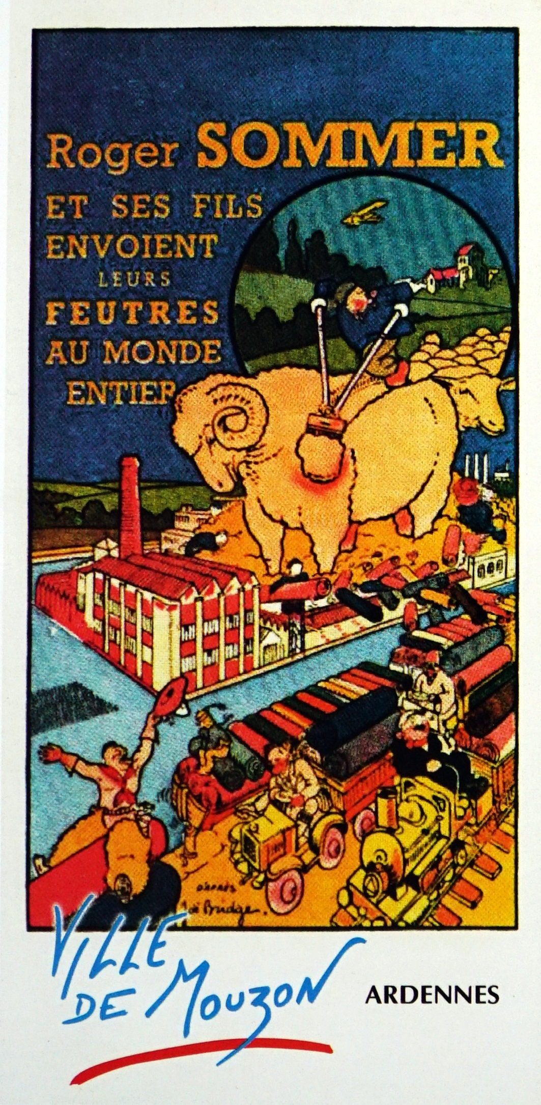 sur une vue ancienne.